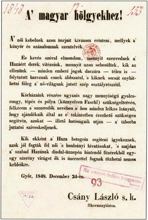 Csány László főkormánybiztos hirdetménye a magyar hölgyekhez kötözőszerek gyűjtésére. Hadtörténelmi Levéltár, HL 1848/49: 52/220. 24 December 1848